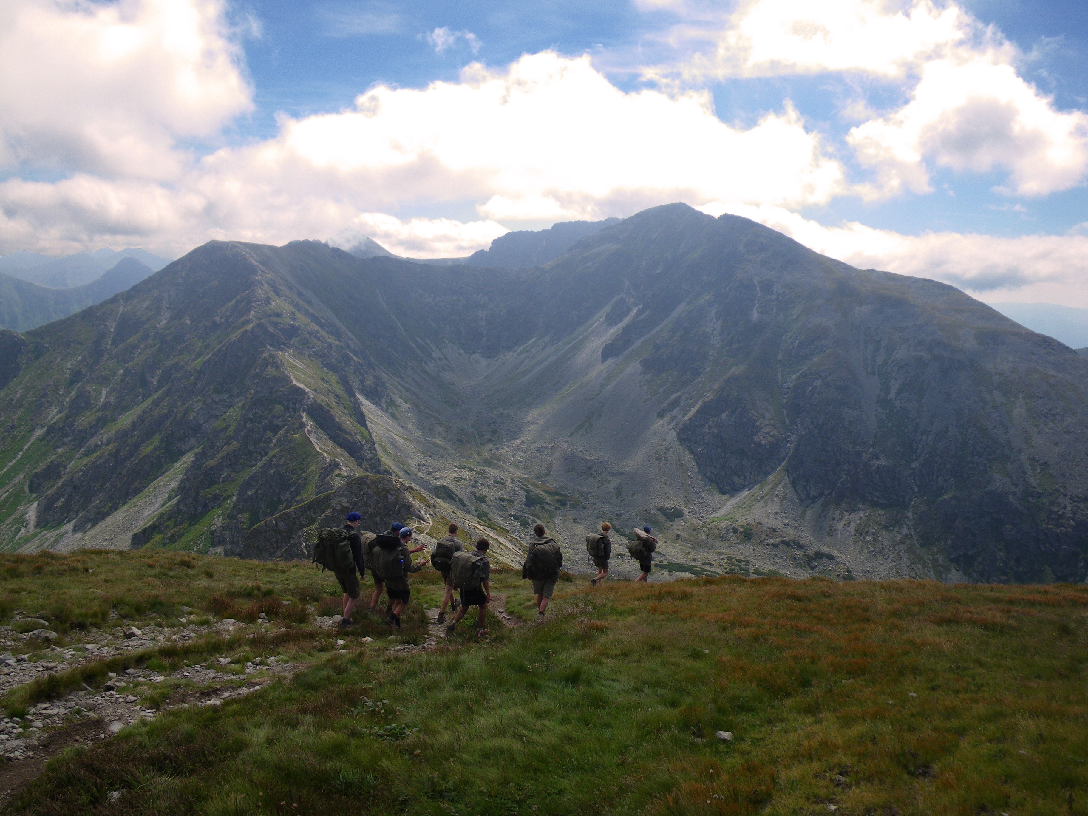 Wandervögel auf Wanderfahrt im Gebirge